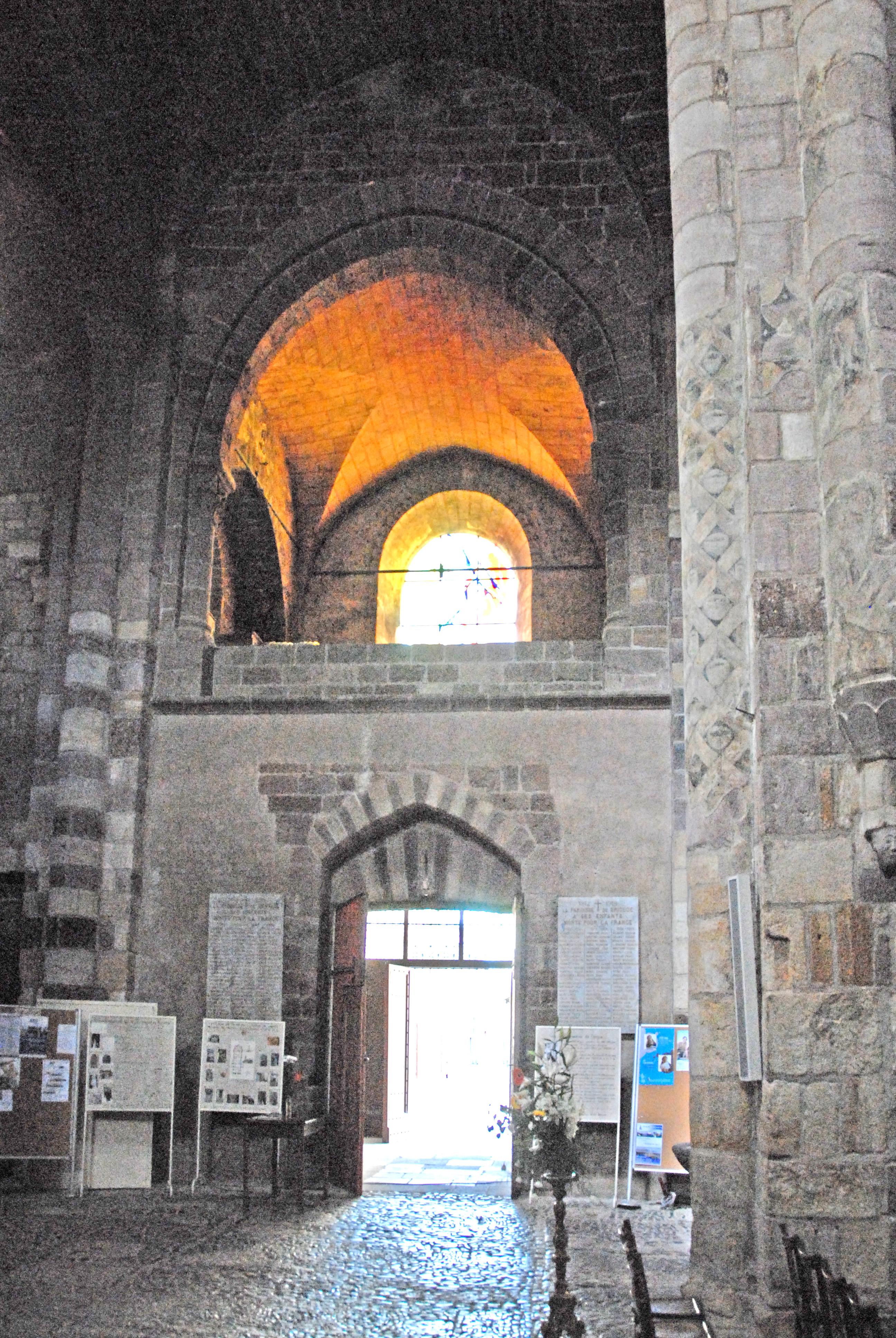 St.-Julien Brioude, Ausgang zu NW-Vorhalle in Joch 2